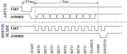 Andmeedastus PS/2 liideses suunal arvutist sisendseadmele. Eraldi on näidatud arvuti ja sisendseadme poolt ühistes liinides tekitatud signaalid.